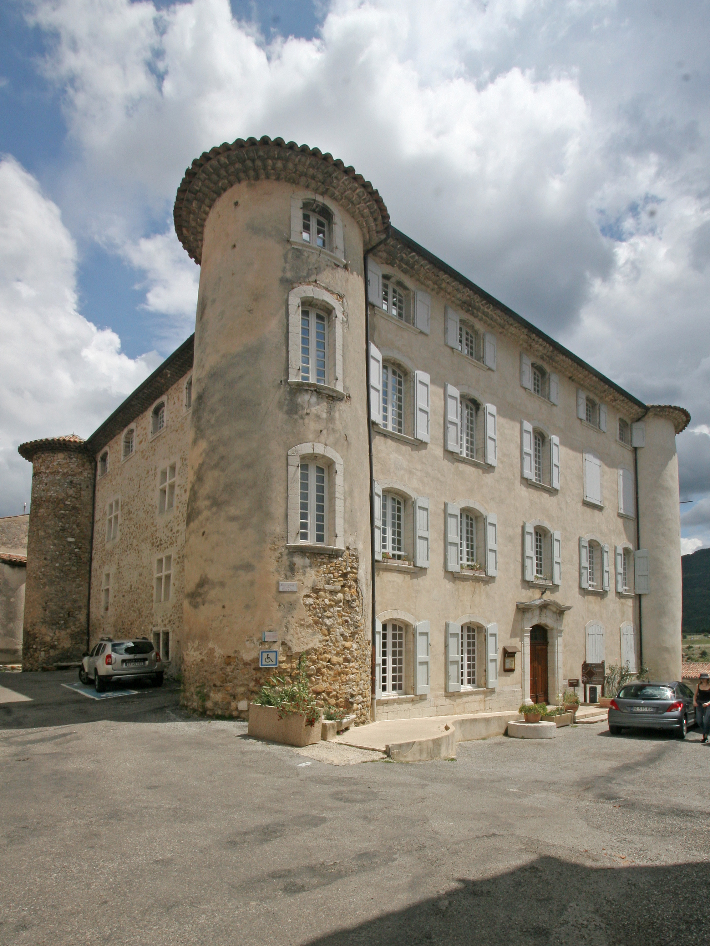 Château de la Palud-sur-Verdon